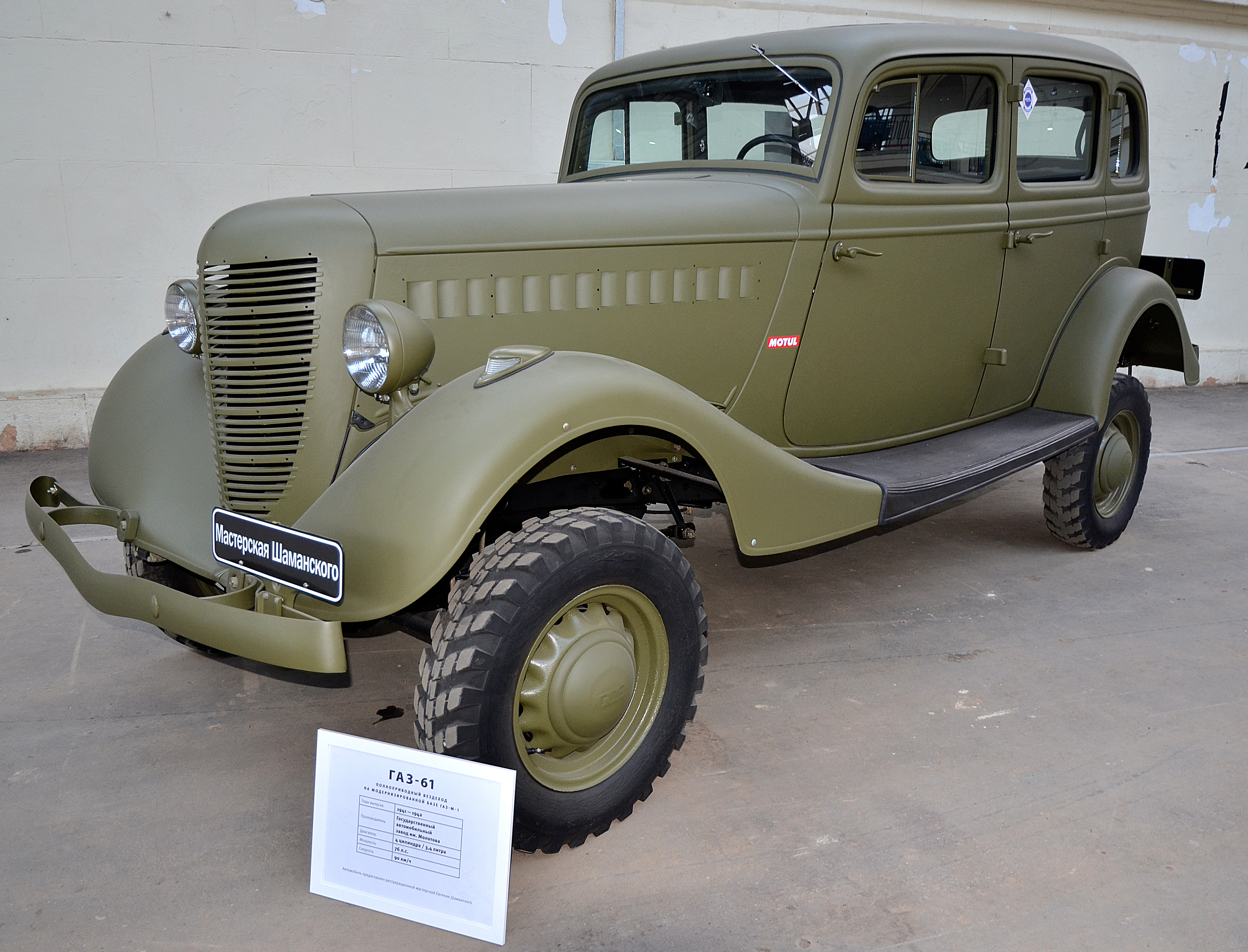 Можно увидеть здесь : You can see here